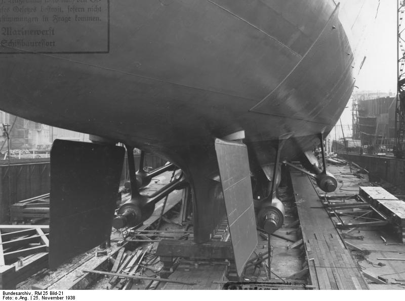 Flugzeugträger "A". Baustadium Aufgen. am 25.11.1938 Deutsche Werke Kiel